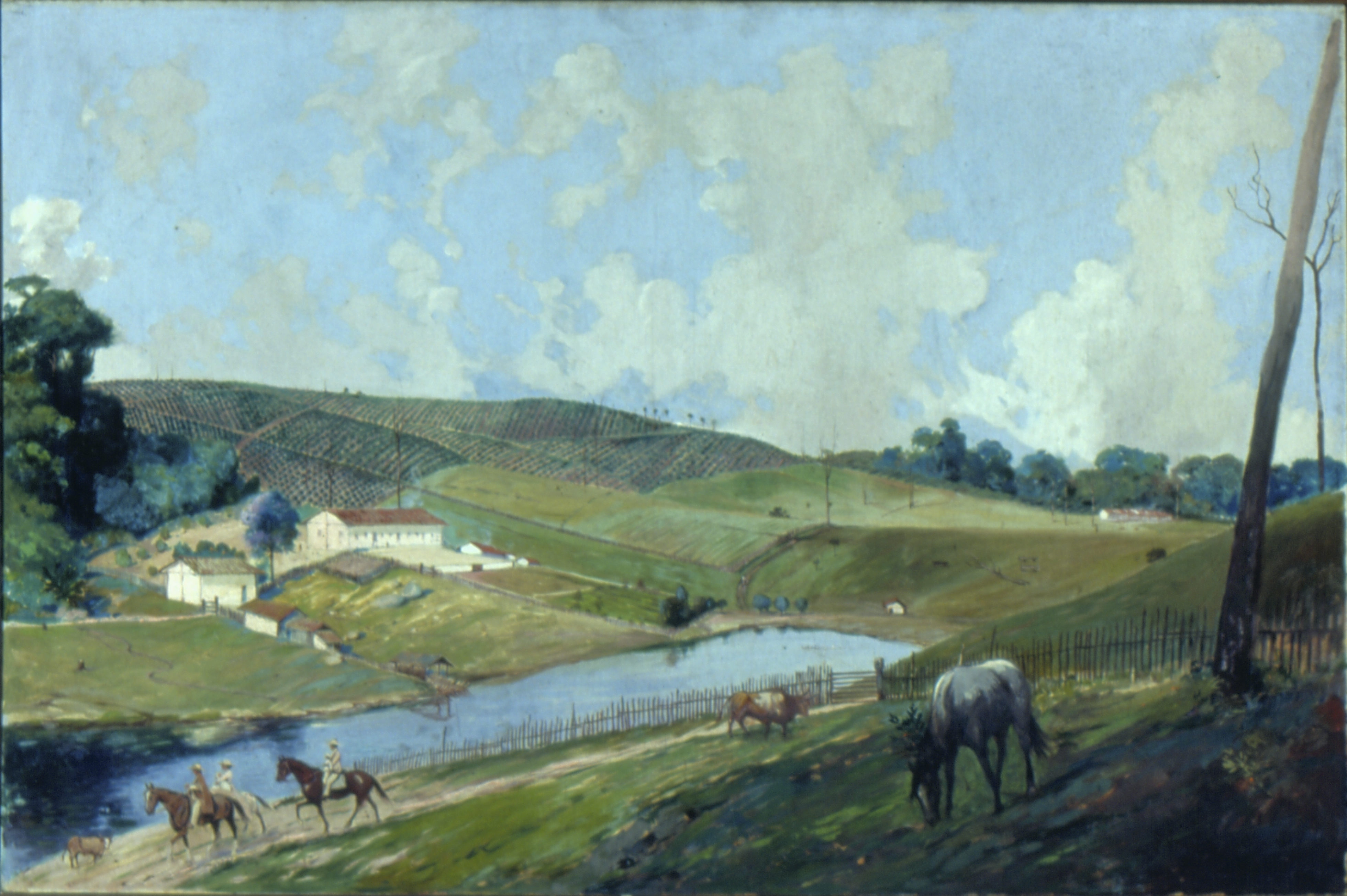 Obra que integra o acervo do Museu Paulista da USP. Coleção Fundo Museu Paulista - FMP